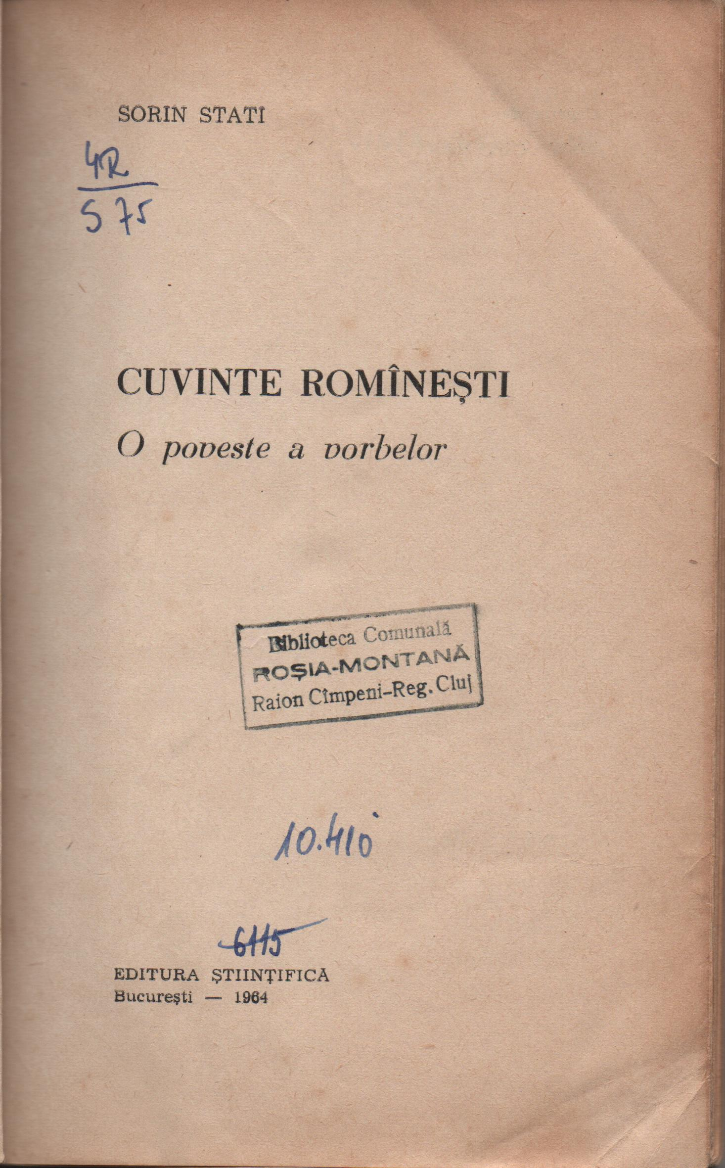 Livre roumain de 1964, Cuvînte Romînesti (mots roumains), O Poveste a Vorbelor (une histoire des mots), de Sorin Stati.